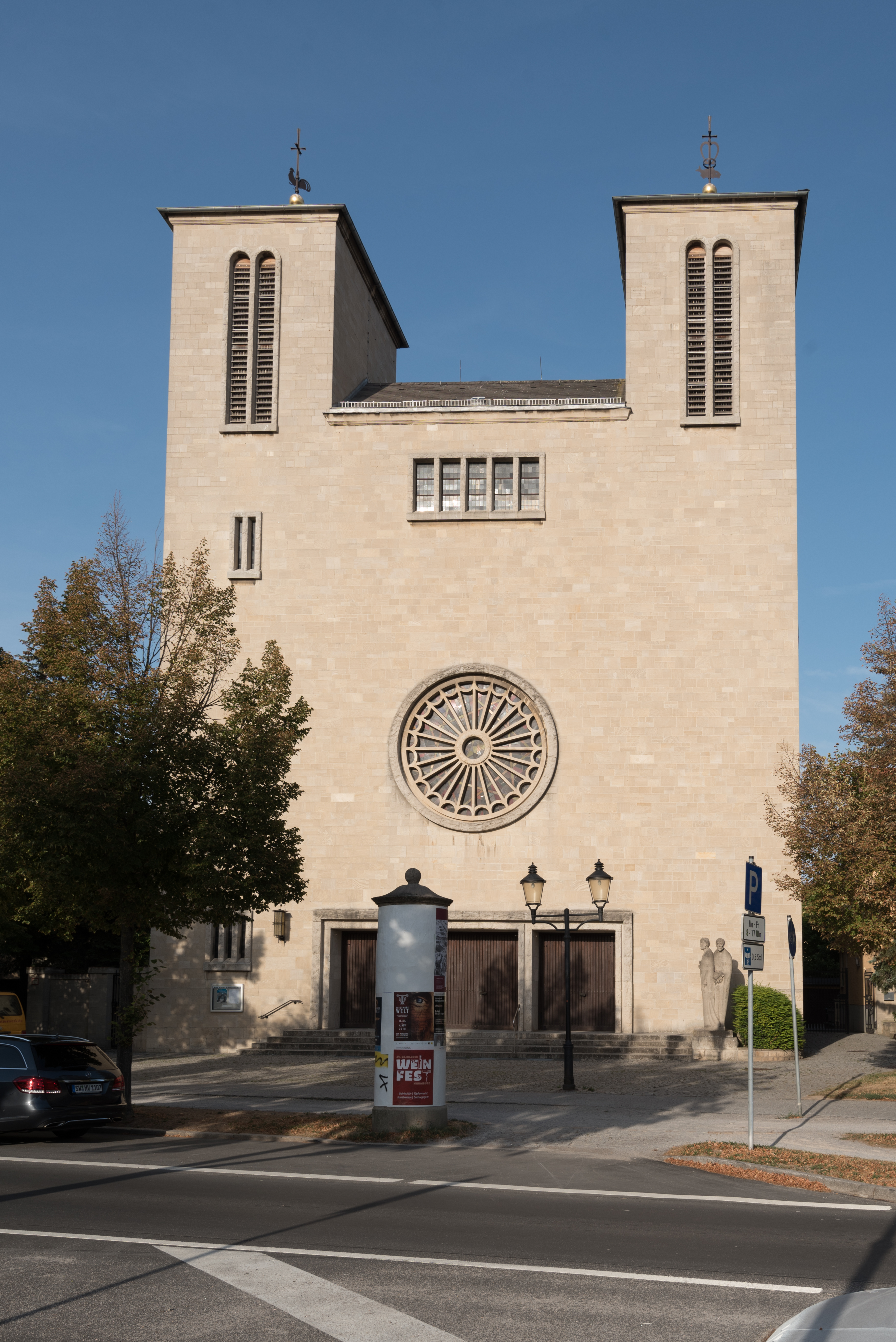 Naumburg (Saale), Kramerplatz 3